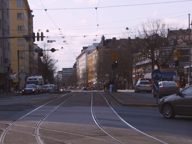 Helsinginkatu, Helsinki